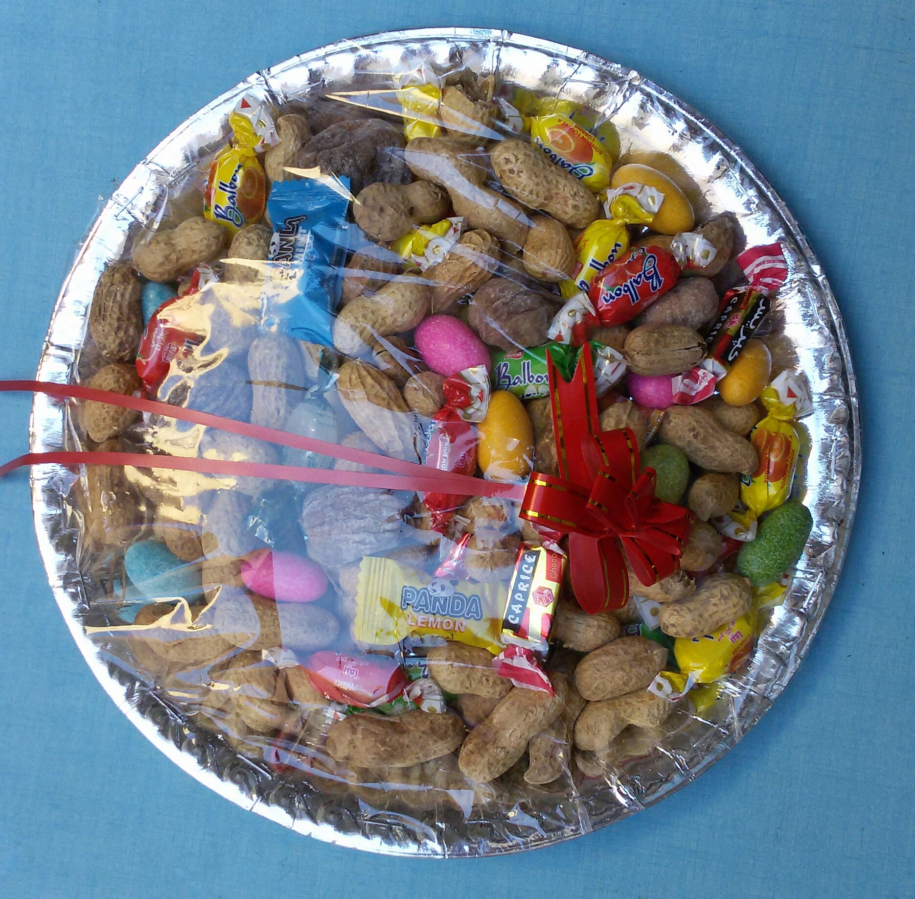 من عادات مدينة الأغواط بمناسبة الاحتفال بالمولد النبوي